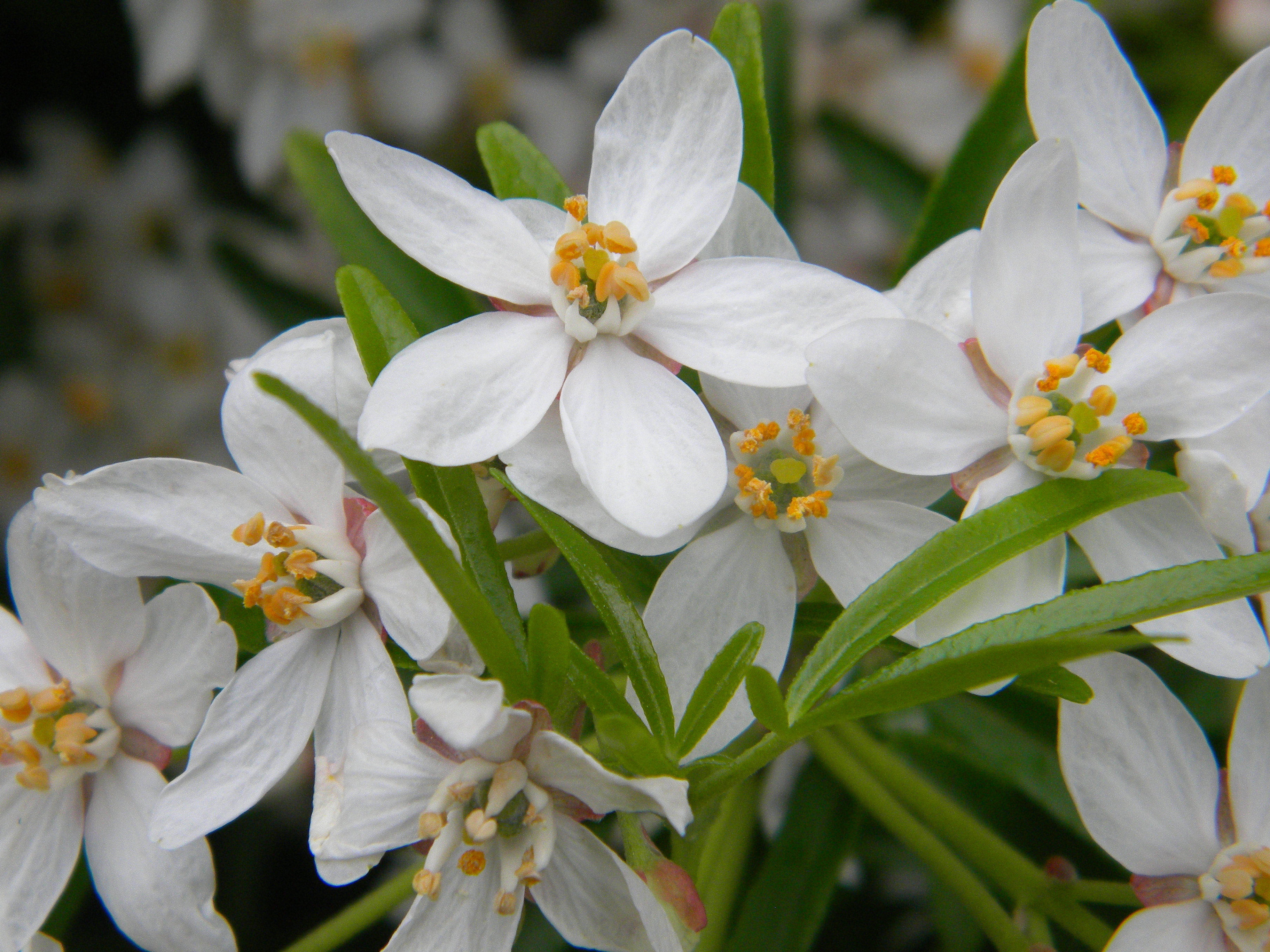 Choisya ternata 'Aztec Pearl' Beaune jardin du carmel